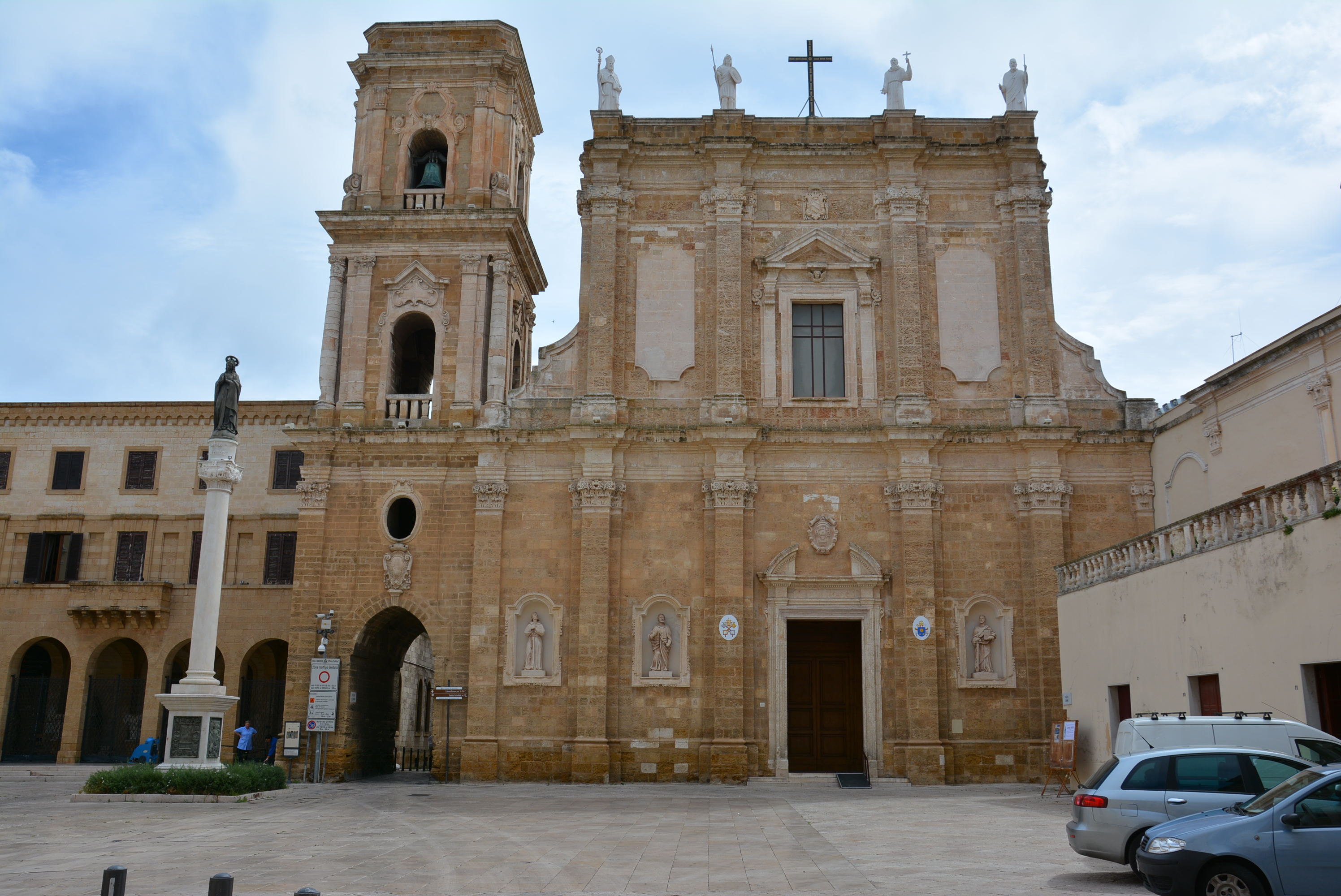 Cattedrale di Brindisi